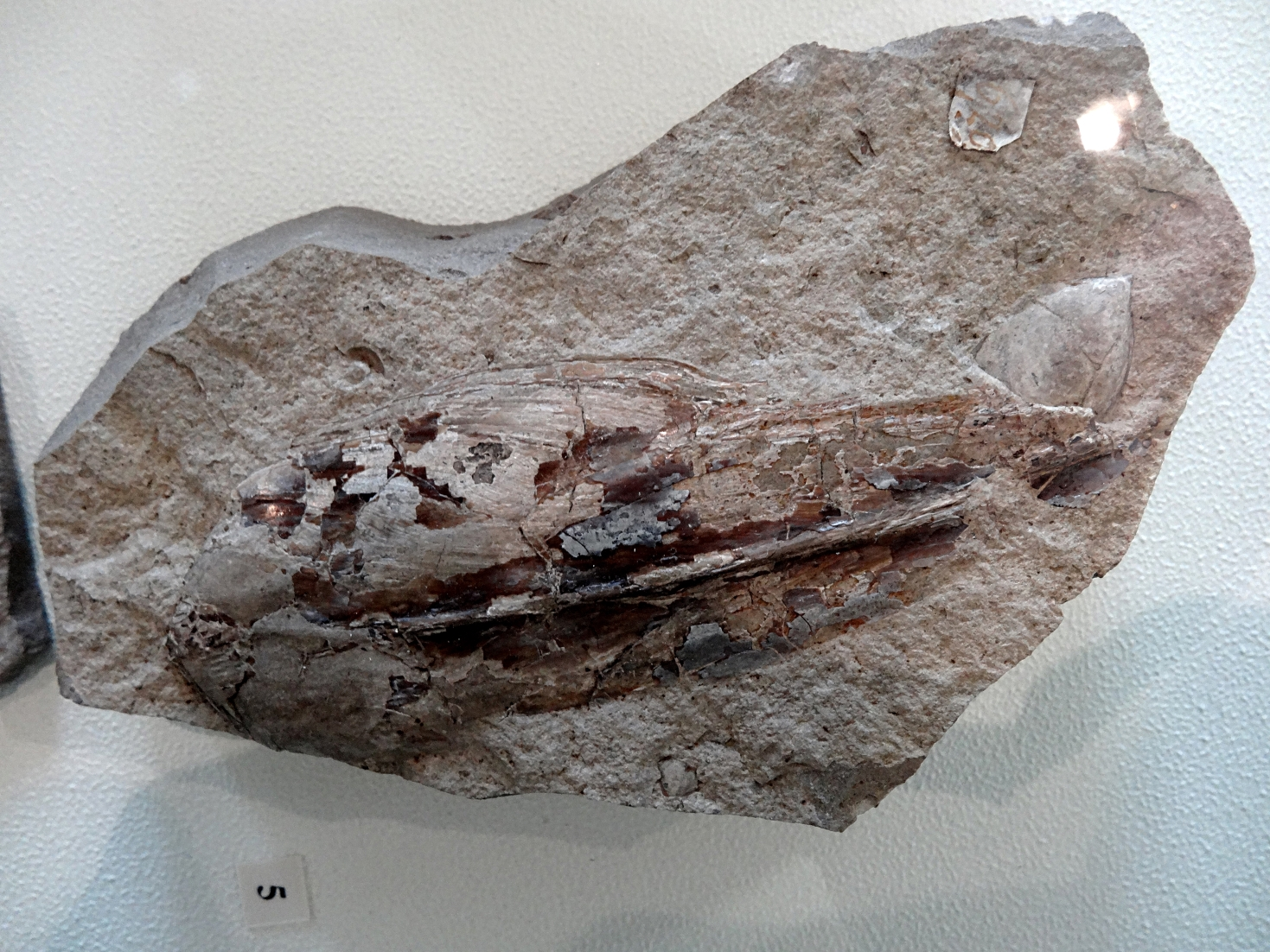 Kalmar Teudopsis bollensis, Schulp aus dem Schwarzen Jura der Fränkischen Alb; Fundort nahe Bad Staffelstein /Oberfranken; Exponat in der Petrefaktensammlung Kloster Banz